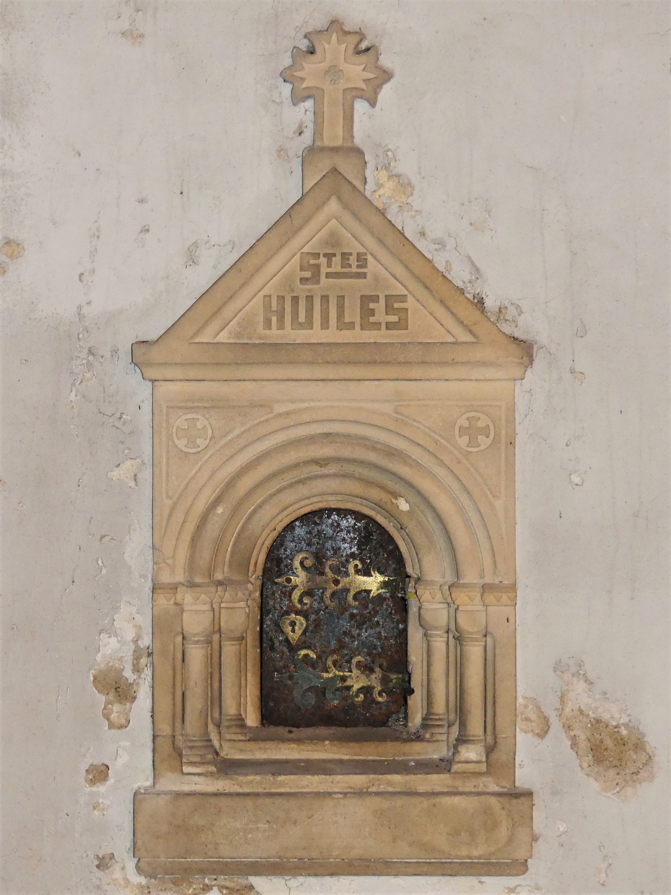 Armoire aux saintes huiles, église de Biras, Dordogne, France.